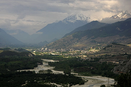 Lichteinfall auf Siders (Sierre)